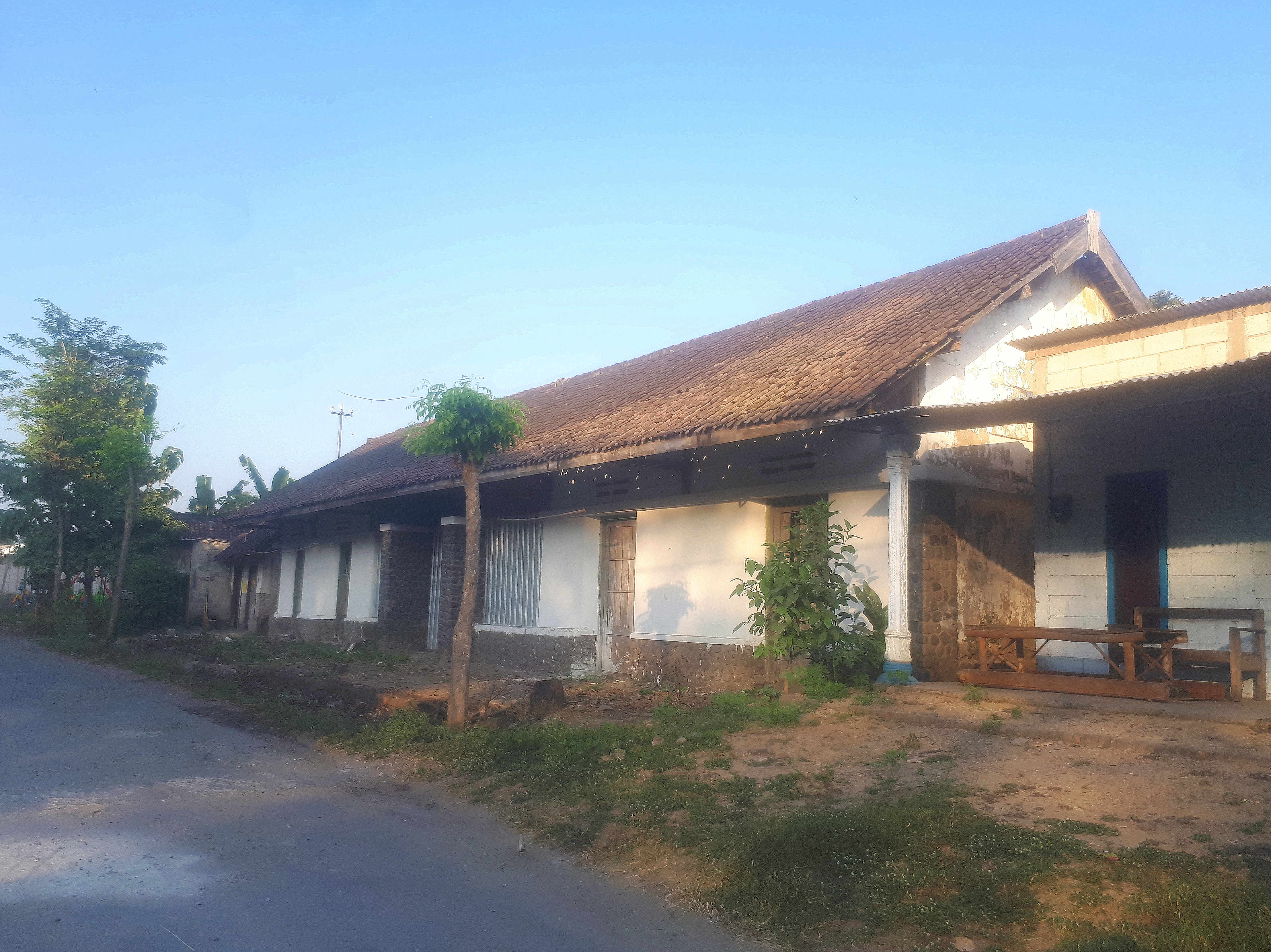 Tampak luar bangunan Stasiun Pagotan, salah satu stasiun nonaktif di Kabupaten Madiun, bersebelahan dengan Pabrik Gula Pagotan